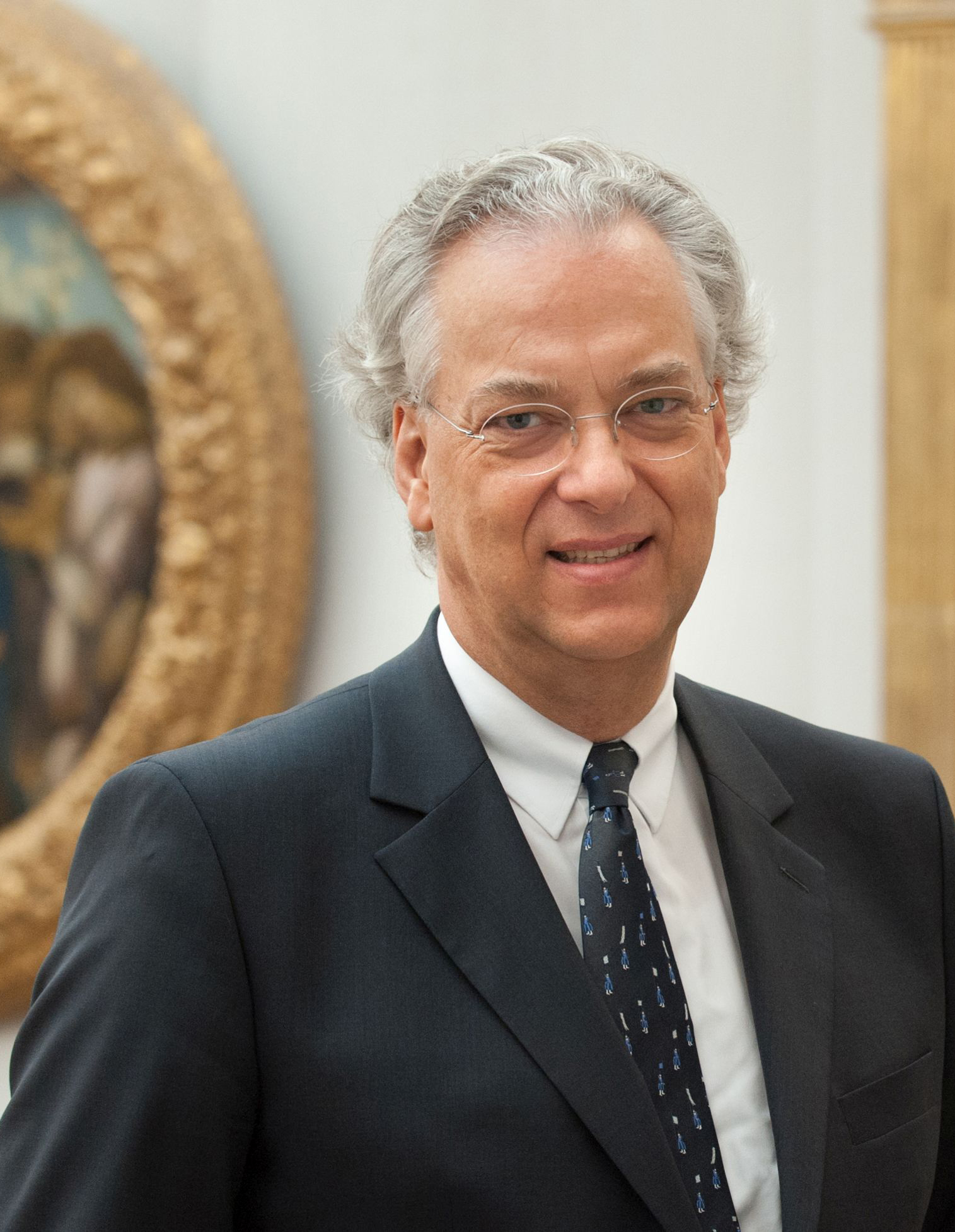 Michael Eissenhauer: Portrait in der Gemäldegalerie Berlin